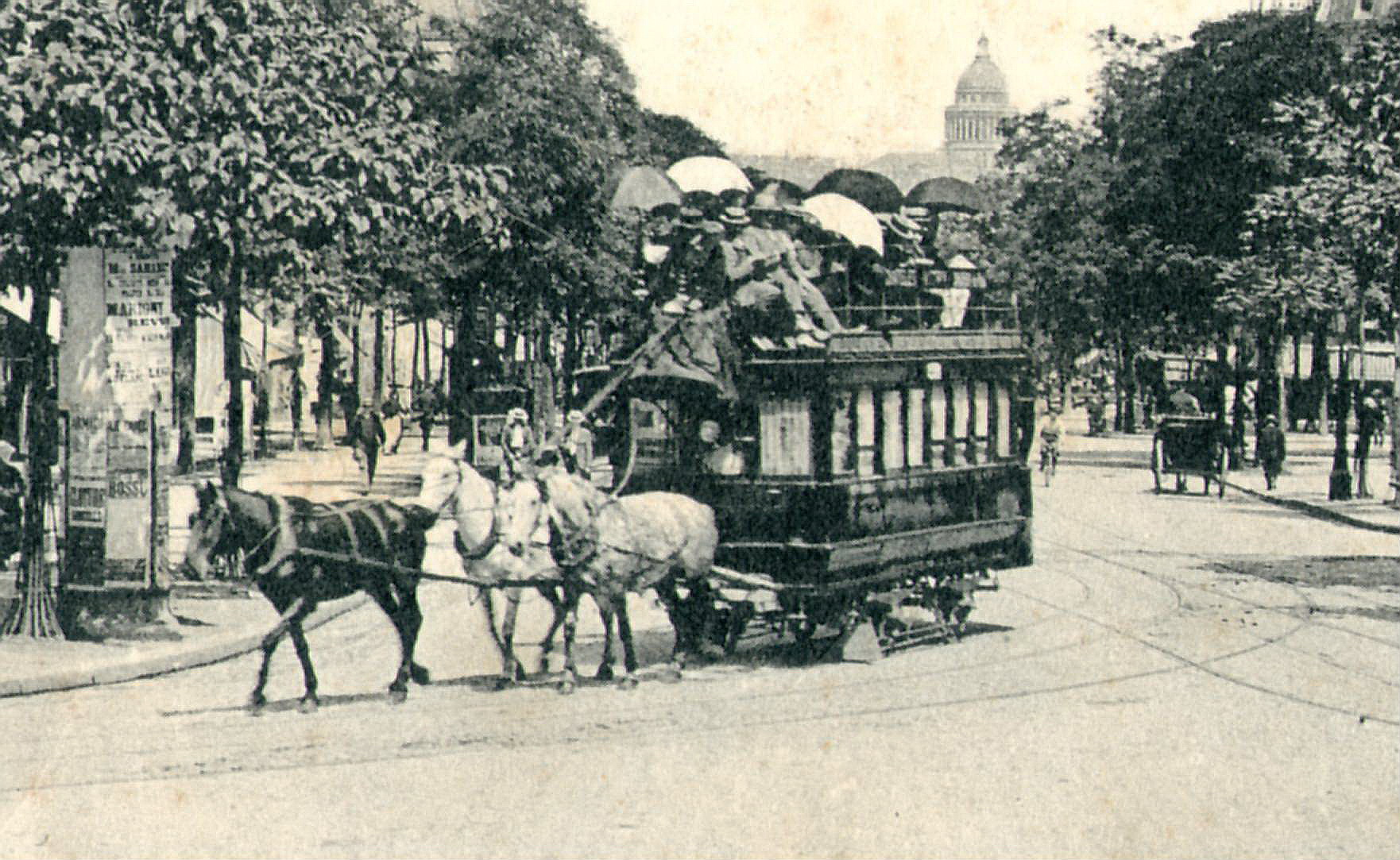 Détail d'une carte postale ancienne éditée par GI, N° 632PARIS : L'avenue des GobelinsDétail sur un tramway à impériale découverte et traction hippomobile, sans doute exploité par la Compagnie générale des Omnibus